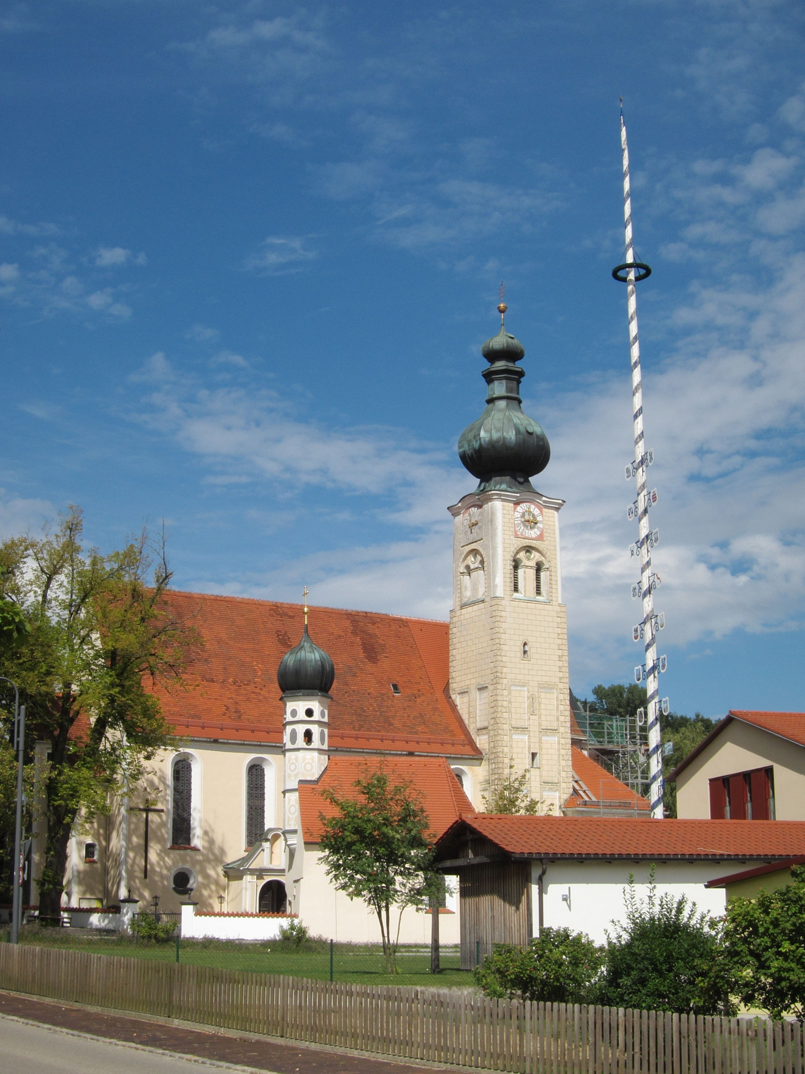 Maria Thalheim; katholische Wallfahrtskirche Maria Thalheim, Wandpfeilerkirche mit eingezogenem Polygonalchor und Zwiebelturm des 14. Jahrhunderts, Chor und Langhaus im Kern Ende 15. Jahrhundert, wohl von Hans Kogler 1670 barockisiert, von Johann Baptist Lethner 1736 umgestaltet; mit Ausstattung.